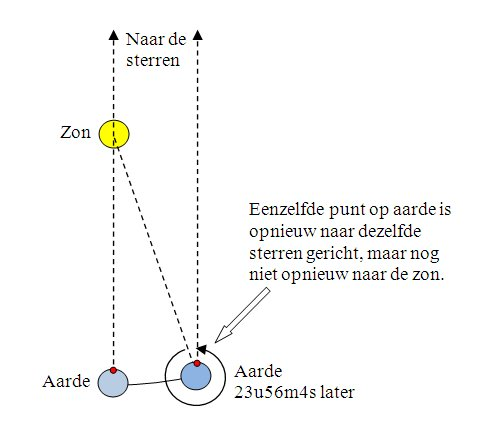 Verschil tussen sterretijd en zonnetijd